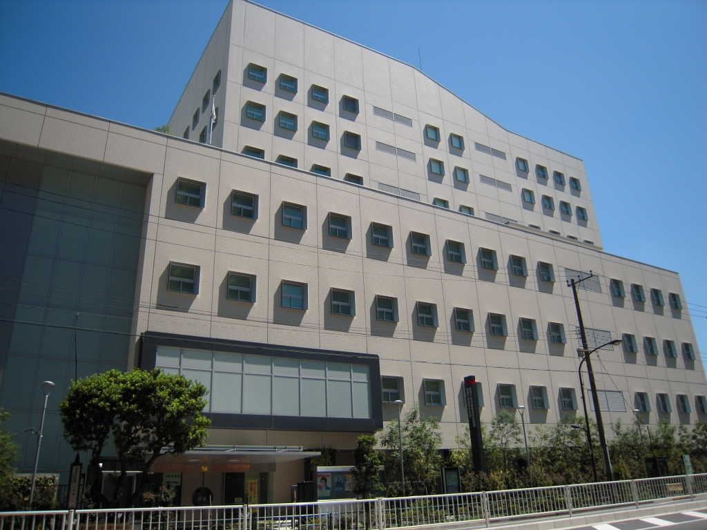 新庁舎（2014年8月）